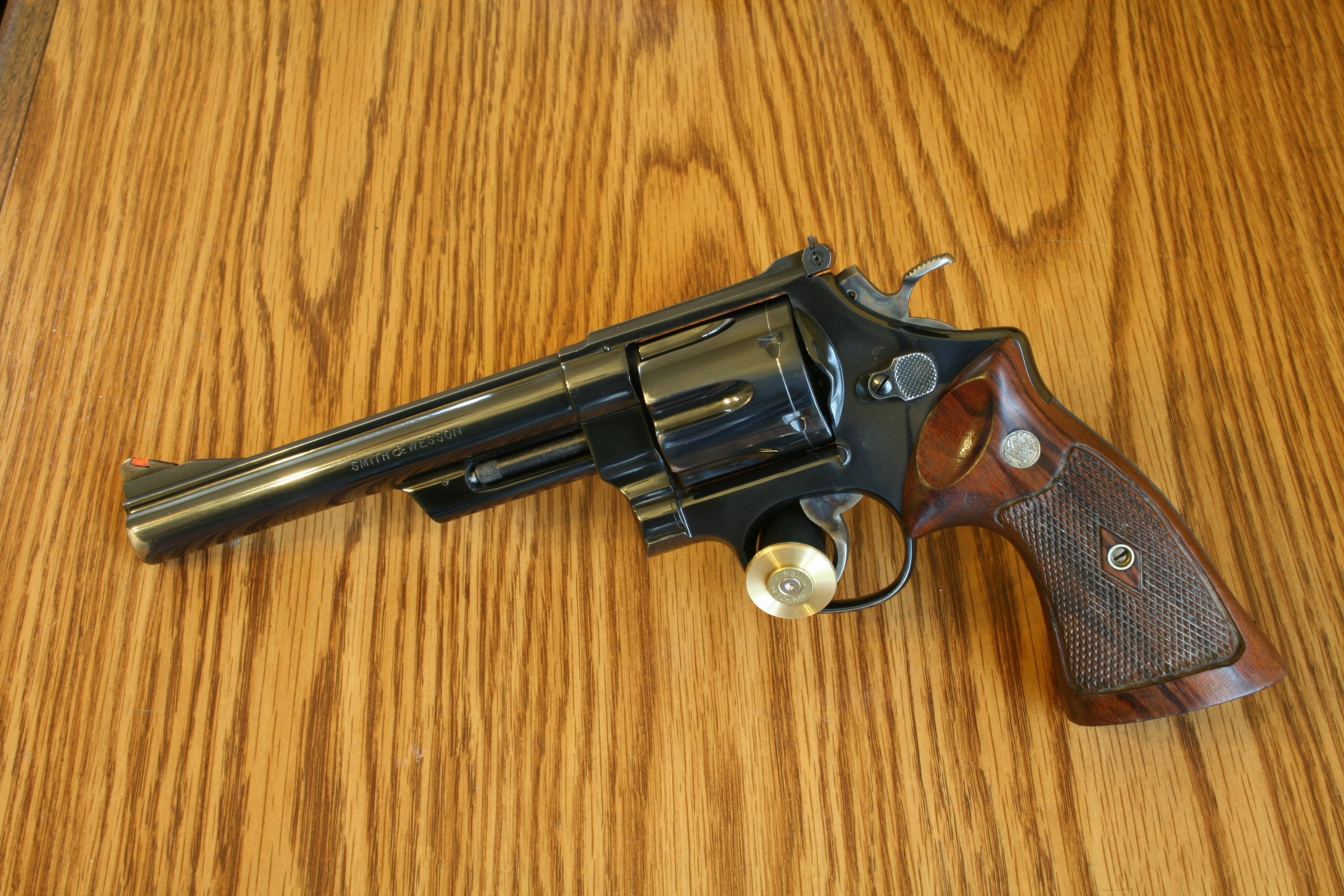 Pre 29 6.5" Barrel